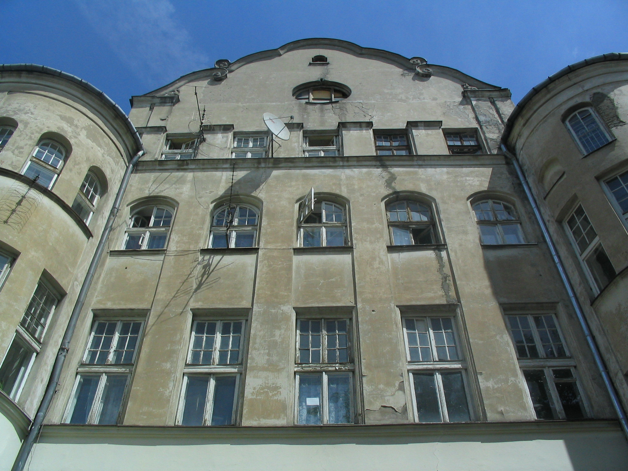 d. Zakład Wychowawczy im. Michała Bergsona, 1913-14 ul. Jagiellońska 28, Warszawa, dz. Praga Północ 05.2010.